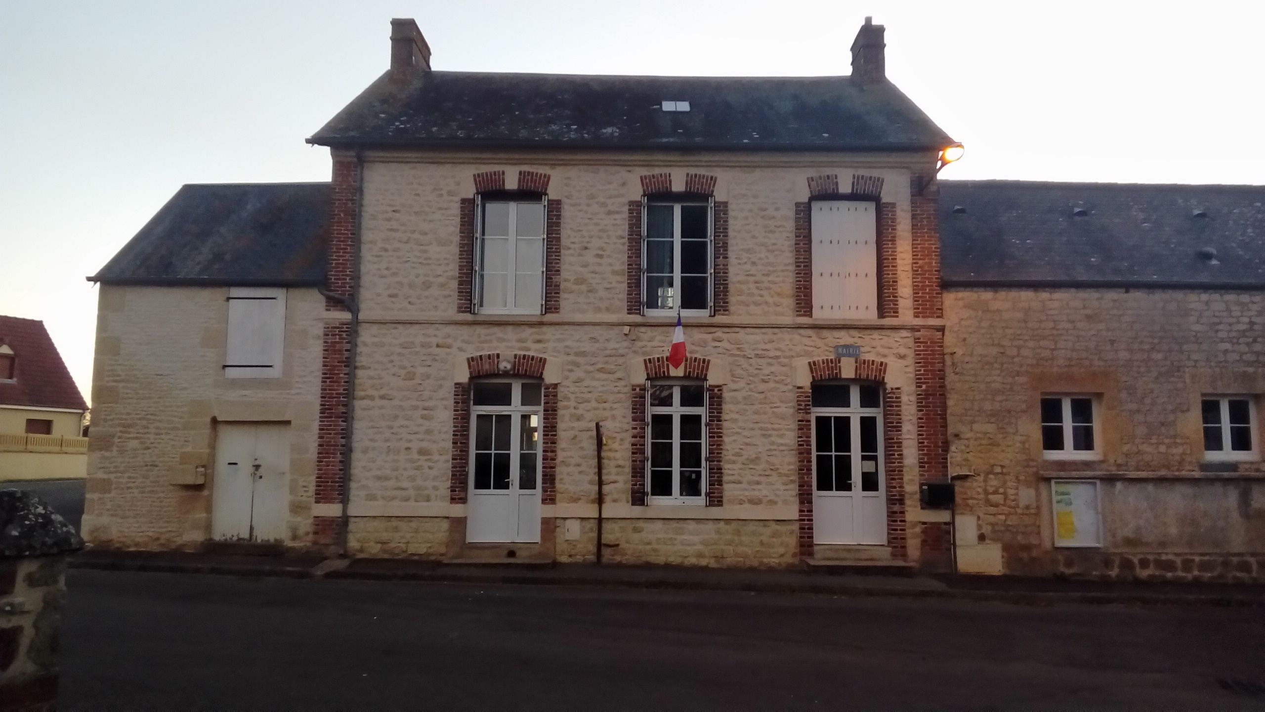 Devrai, Orne